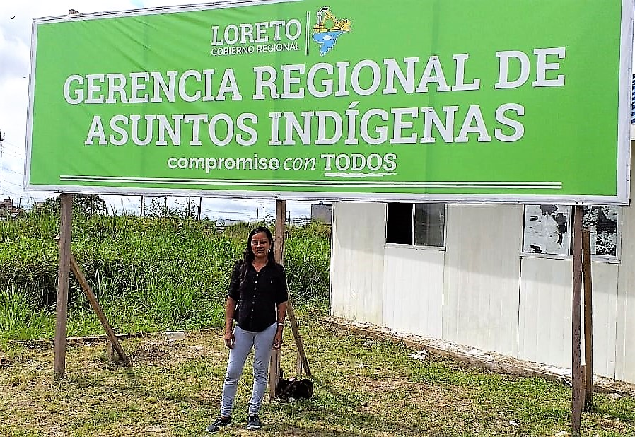 Liz Chicaje es una líder Bora que trabaja por los derechos indígenas, la protección de los bosques y la preservación de la biodiversidad amazónica. Ella desarrolla un trabajo coordinado y articulado con la Gerencia Regional de Asuntos Indígenas del Gobierno Regional de Loreto así como con otras autoridades e instituciones locales, regionales y nacionales.